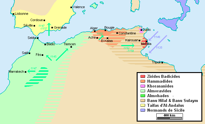 Territoires des Zirides et Hammadides à la suite des invasions hilaliennes, des incursions normandes et de l'affaiblissement des Almoravides Carte exprimant les données historiques telles que rapportees par: -Idris H. Roger, L'invasion hilālienne et ses conséquences, dans : Cahiers de civilisation médiévale (43), Jul.-Sep. 1968, pp.353-369. [1] -The Zirid dynasty, sur [2] -Les Zirides et les Hammadides (972-1152), sur [3] -Les Almoravides (1056-1147), sur [4] -Les Almohades (1130-1269), sur [5] -Pascal Buresi, Vie et mort des empires berbères, dans : L'Histoire (336), nov. 2008, p.73 [6] -Georges Duby, Atlas Historique Mondial, Ed. Larousse 1987